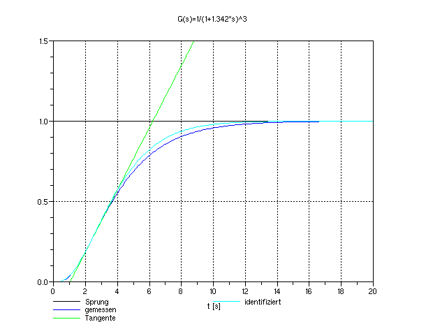 Systemidentifizierung mit Wendetangenten-Methode